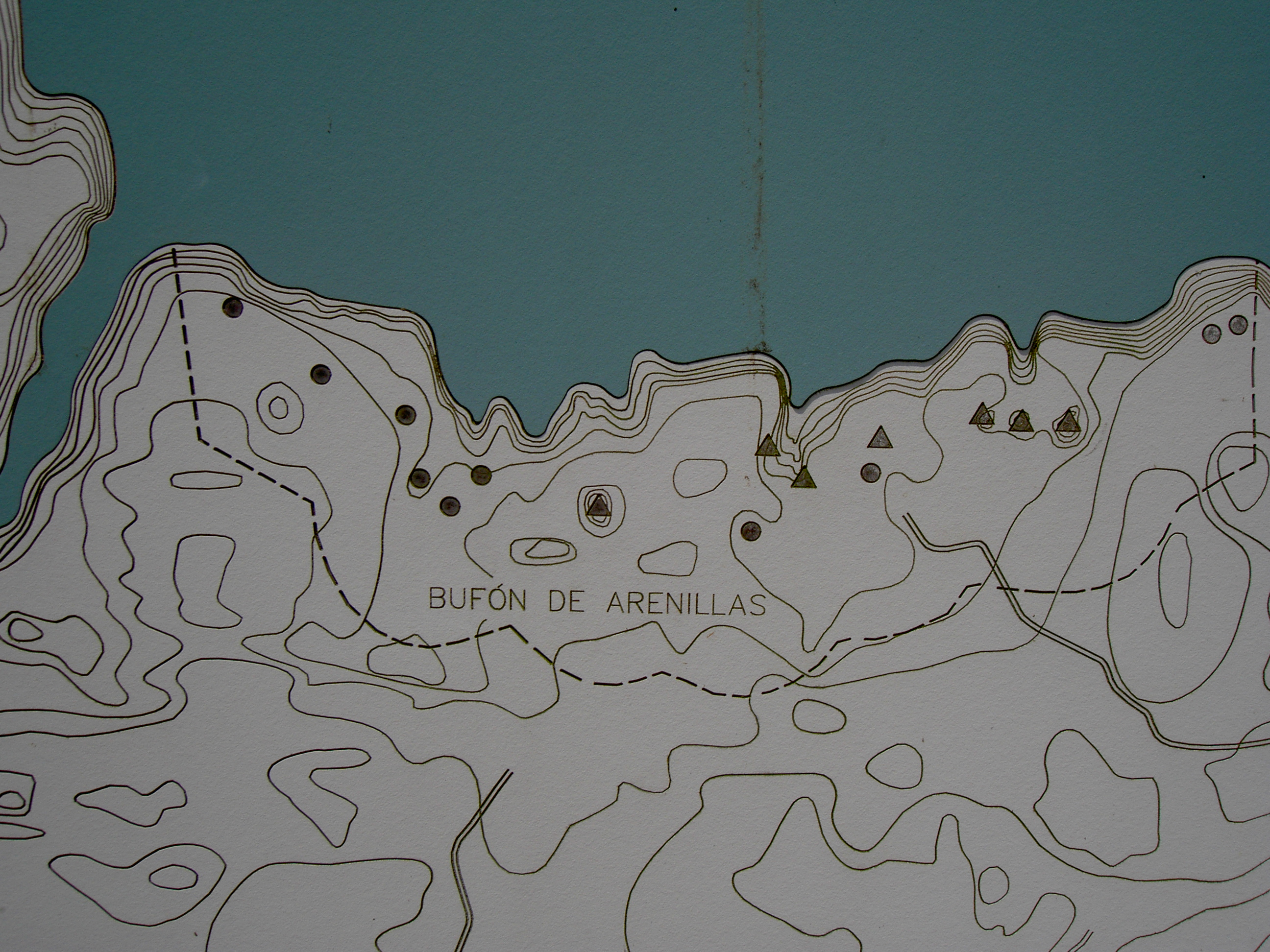 Bufónes de Arenillas, Schautafel